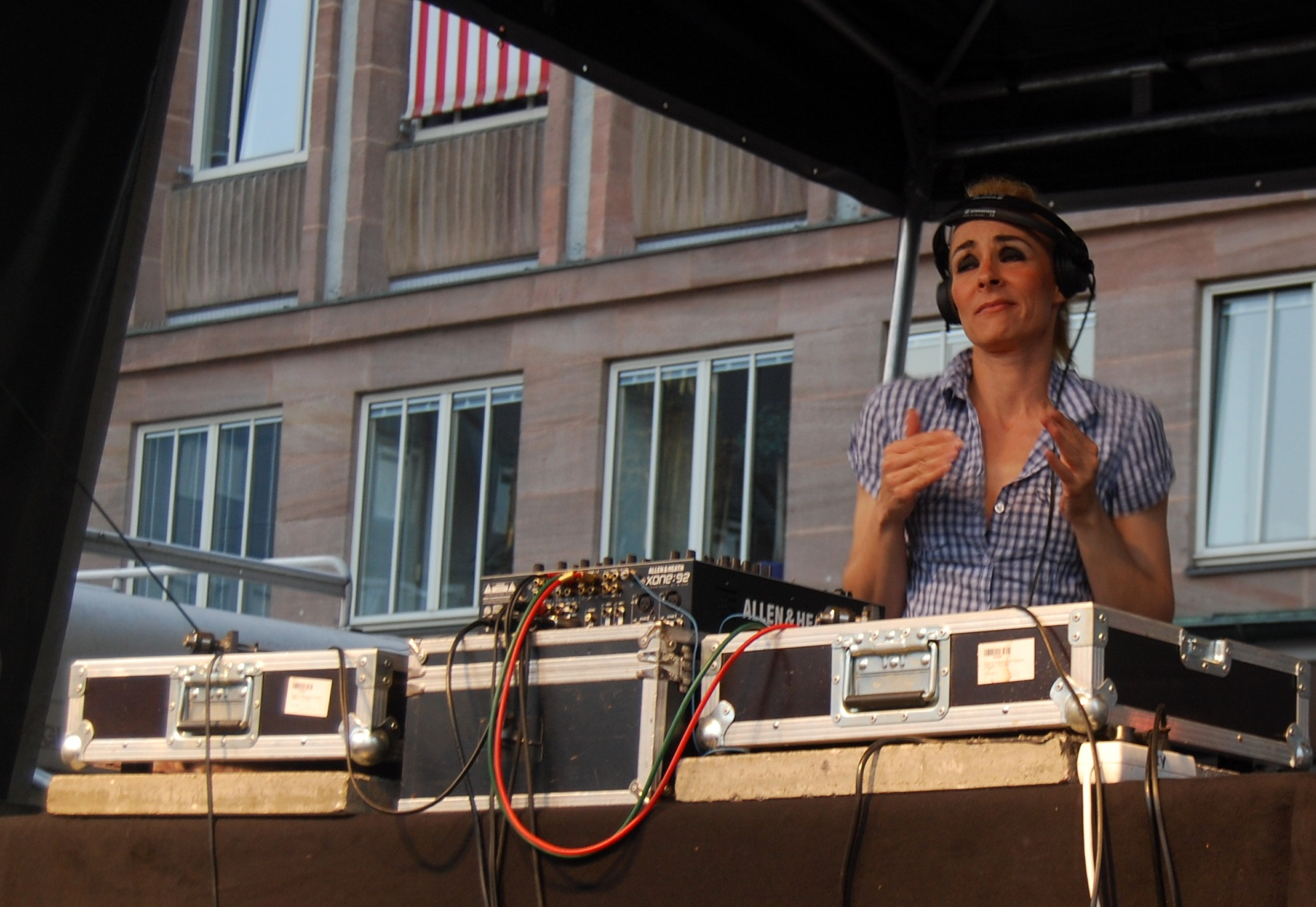 Marusha am Nürnberger Hauptmarkt. Veranstaltung zur Erhalt des Z-Baus.